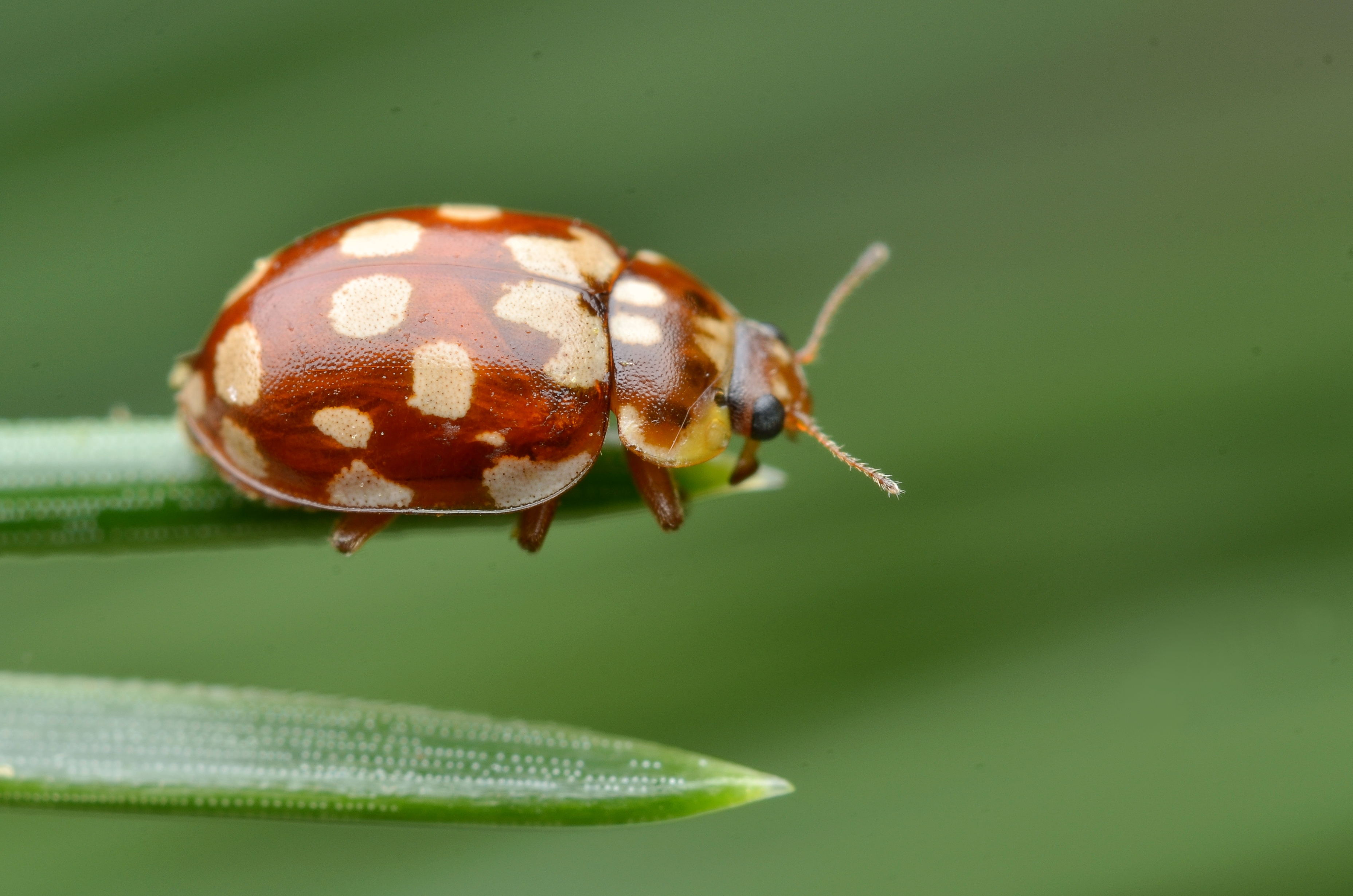 Myrrha octodecimguttata